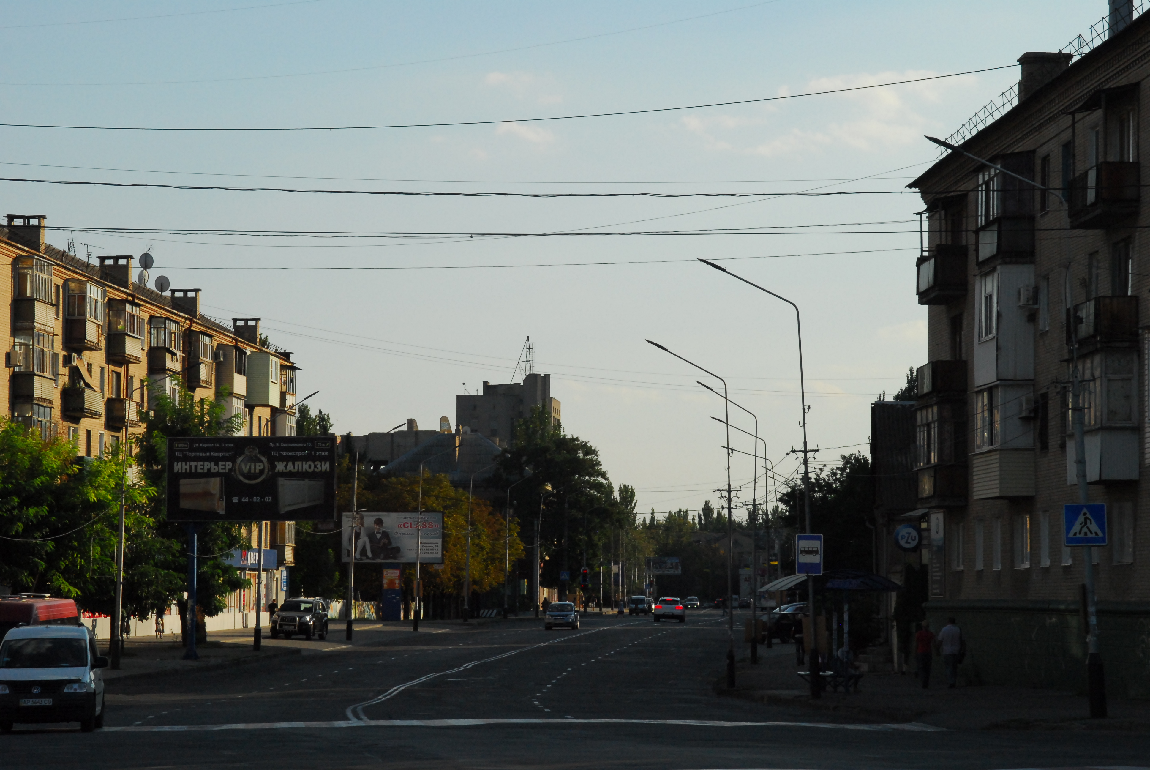 просп. Богдана Хмельницького